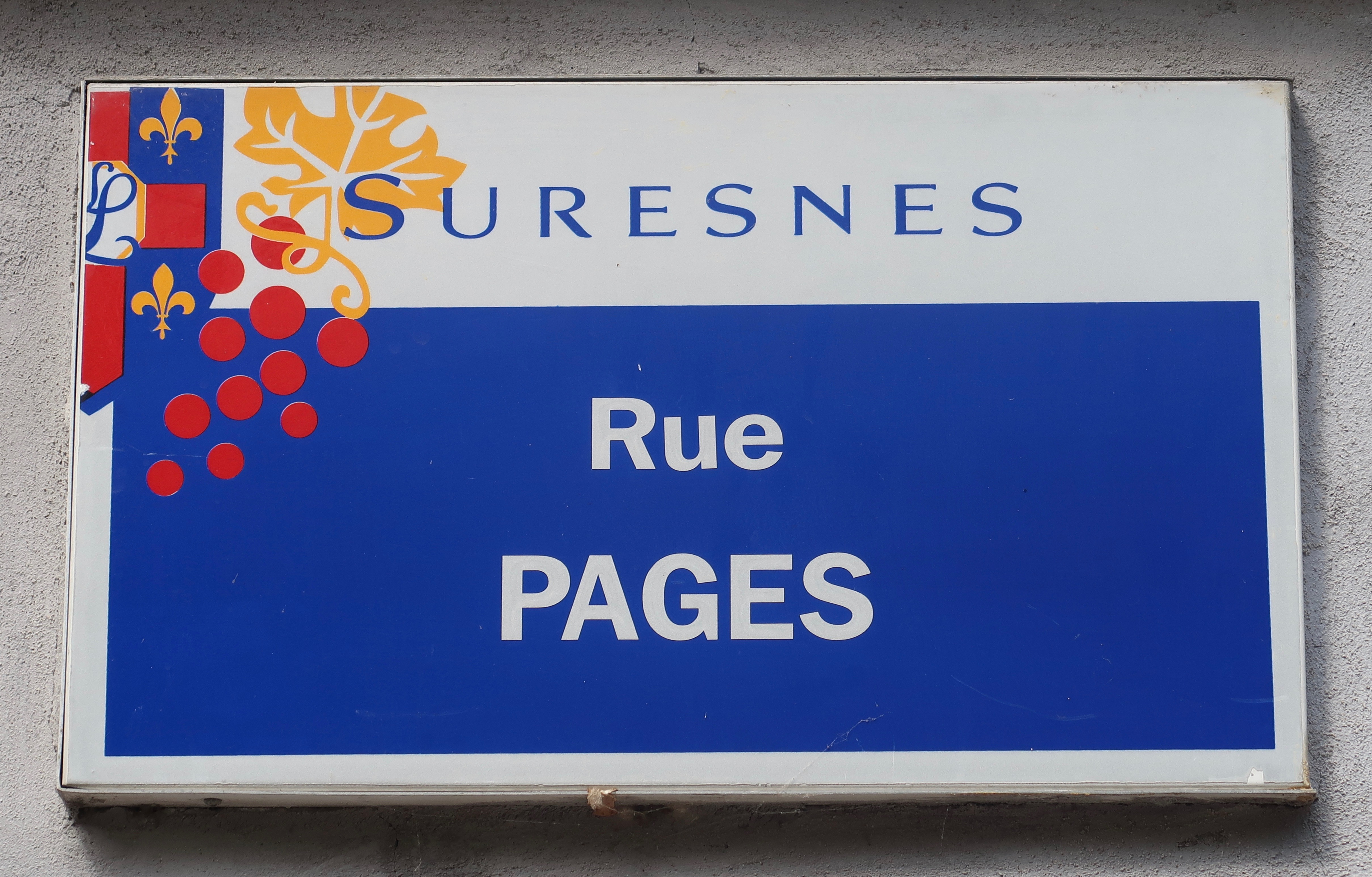 Plaque de la rue Pagès à Suresnes (Hauts-de-Seine).